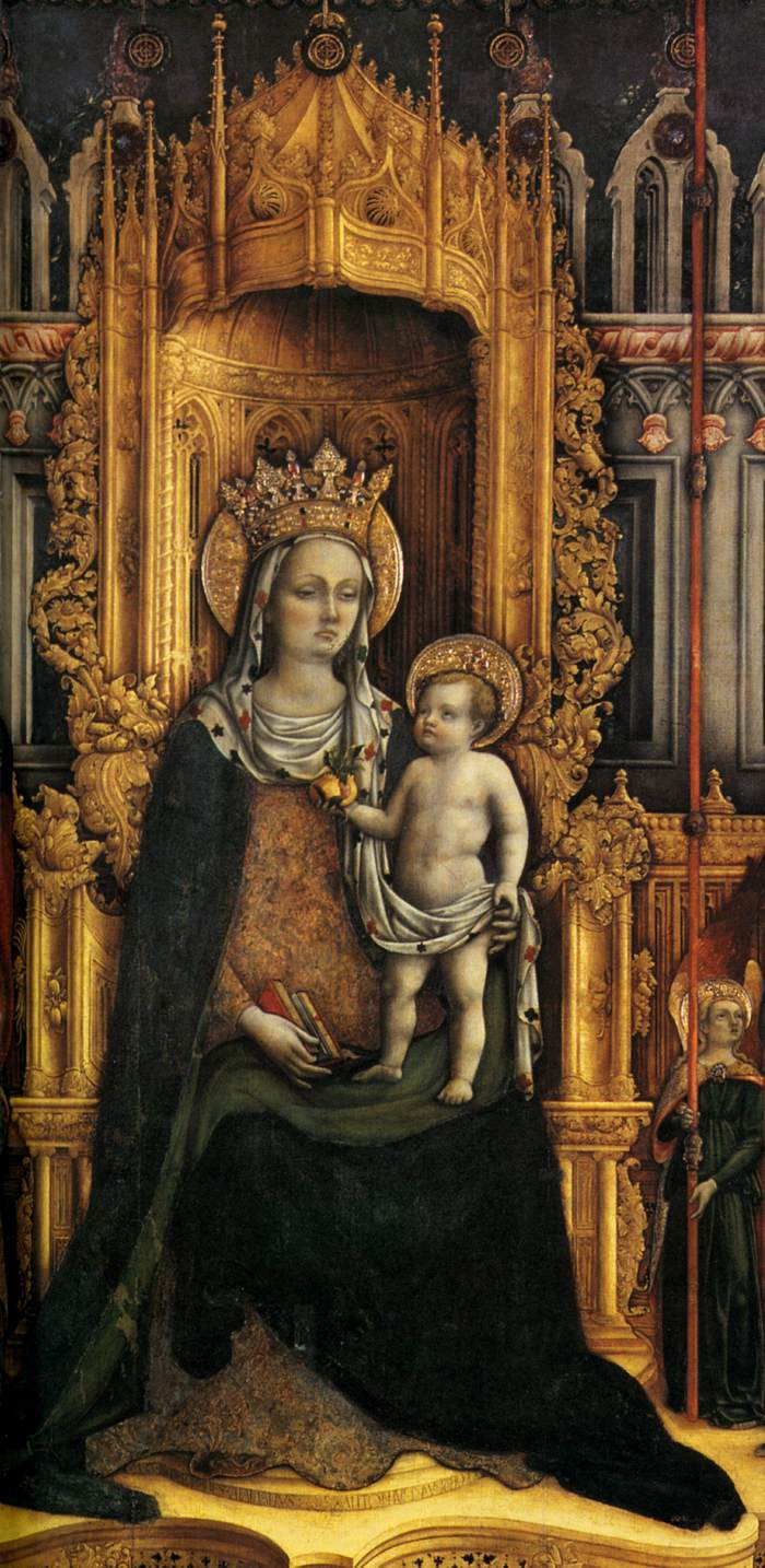 detail